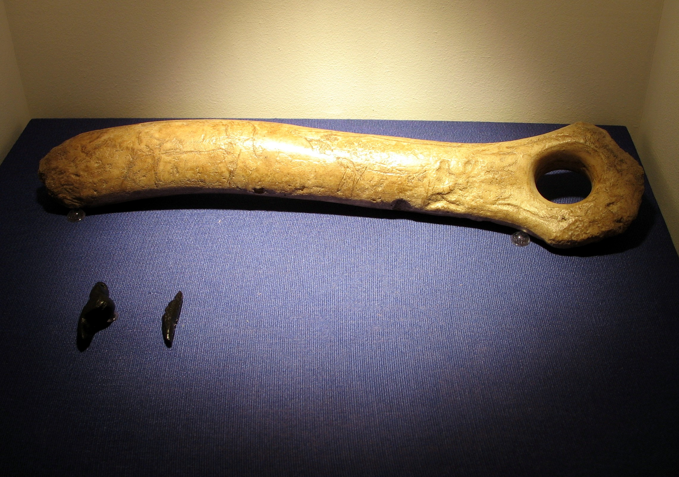 Description: Eiszeitliche Funde: Knochenwerkzeug zur Glättung von Speeren aus Rentierknochen, verziert mit Rentierdarstellungen; zwei stilisierte Frauenfiguren, geschnitzt aus Gagat. Archäologisches Landesmuseum Konstanz Photographer: User:Opodeldok